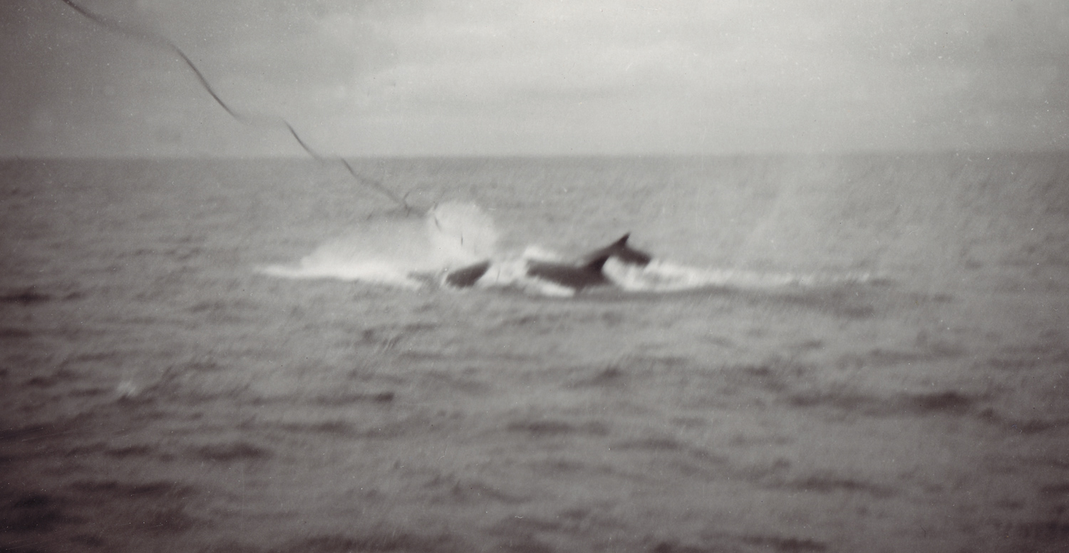 Whaling